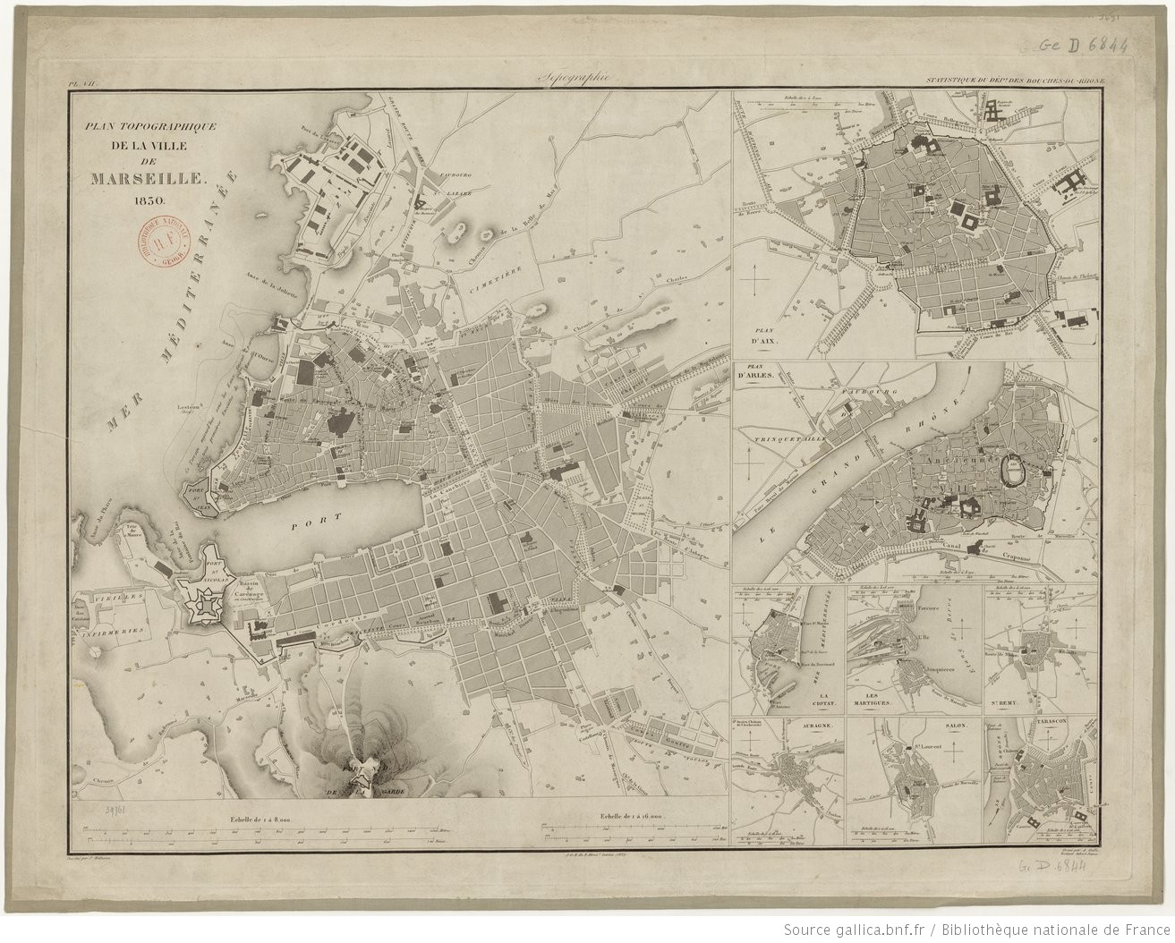 Plan topographique de la ville de Marseille en 1830 par Philippe Matheron (1807-1899).